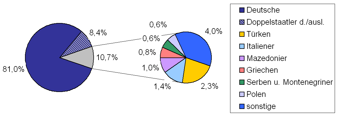 Verteilung der Nationalitäten in Leverkusen, Stand 12/2006, Quelle: Statistik auf